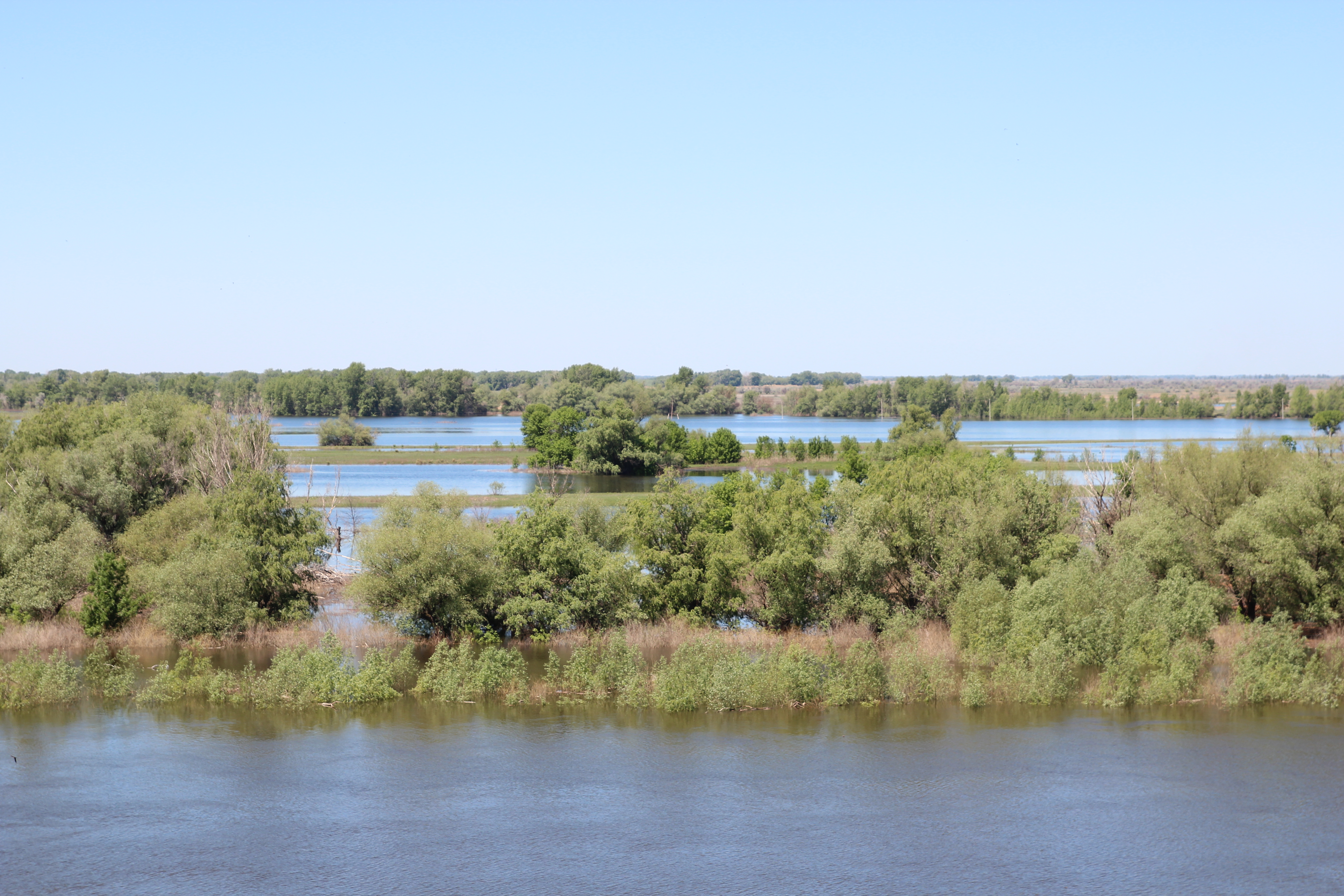 Волго-Ахтубинское междуречье, Ахтубинский район This image is related to the protected area of Russia number 3010003